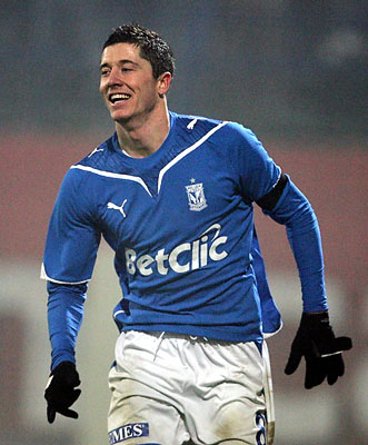 Piłkarz Lecha Poznań i Reprezentacji Polski